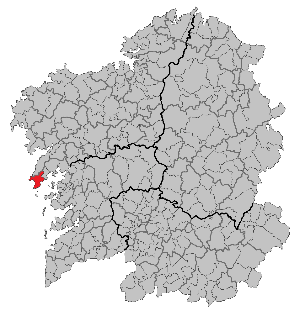 Mapa coa localización do concello de Ribeira.